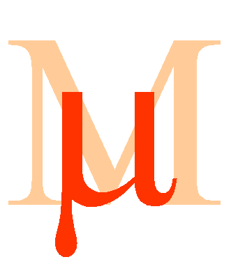 Greek letter